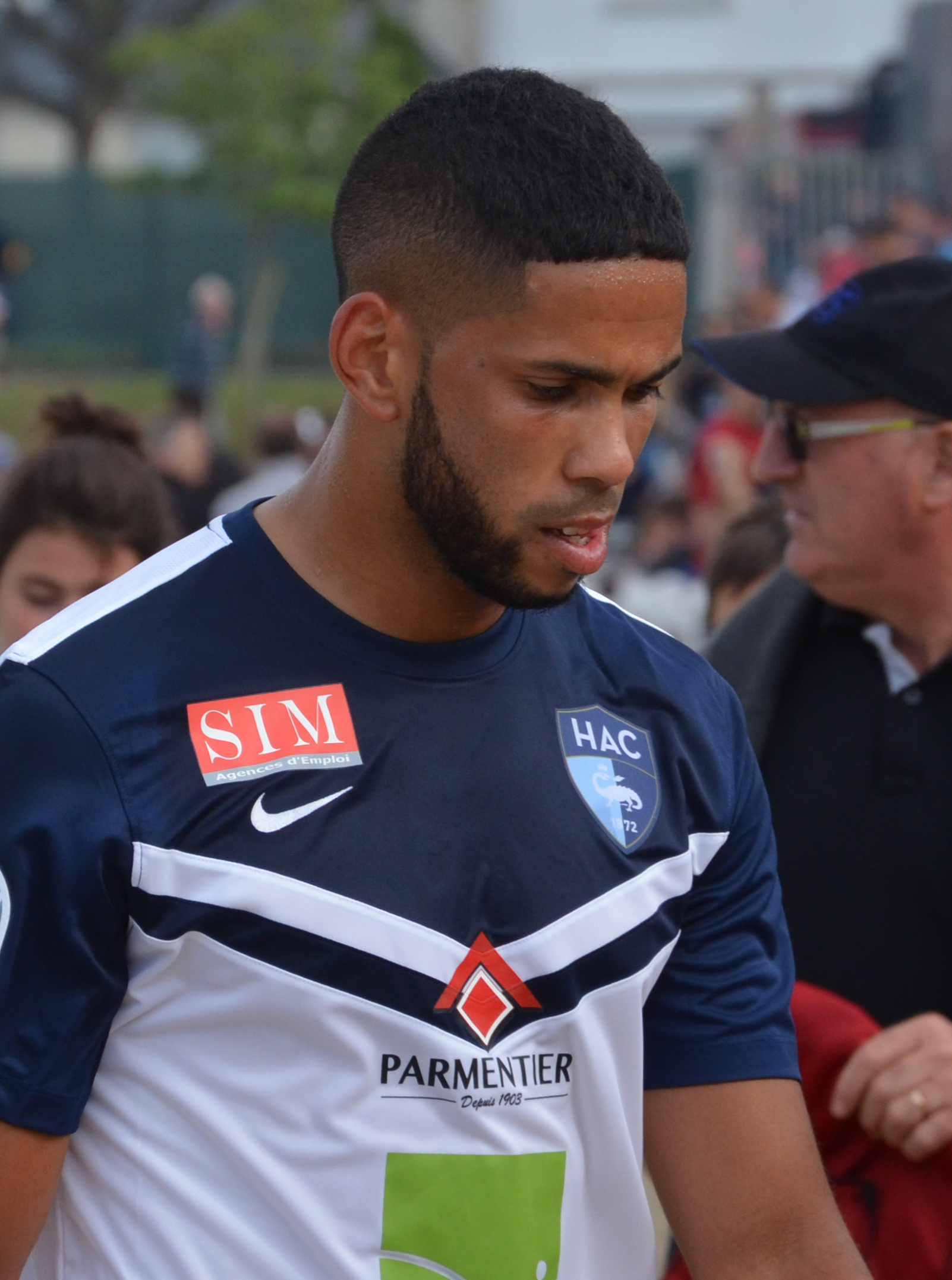 Photographie prise lors du match opposant le Stade rennais au Havre AC en amical au stade Paul-Audrin de Dinard le 8 juillet 2015. Ici, Jérôme Mombris.